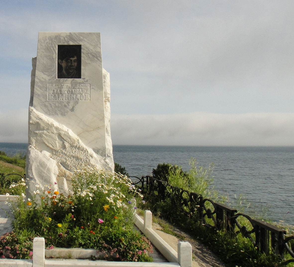 Памятник А. Вампилову в Листвянке